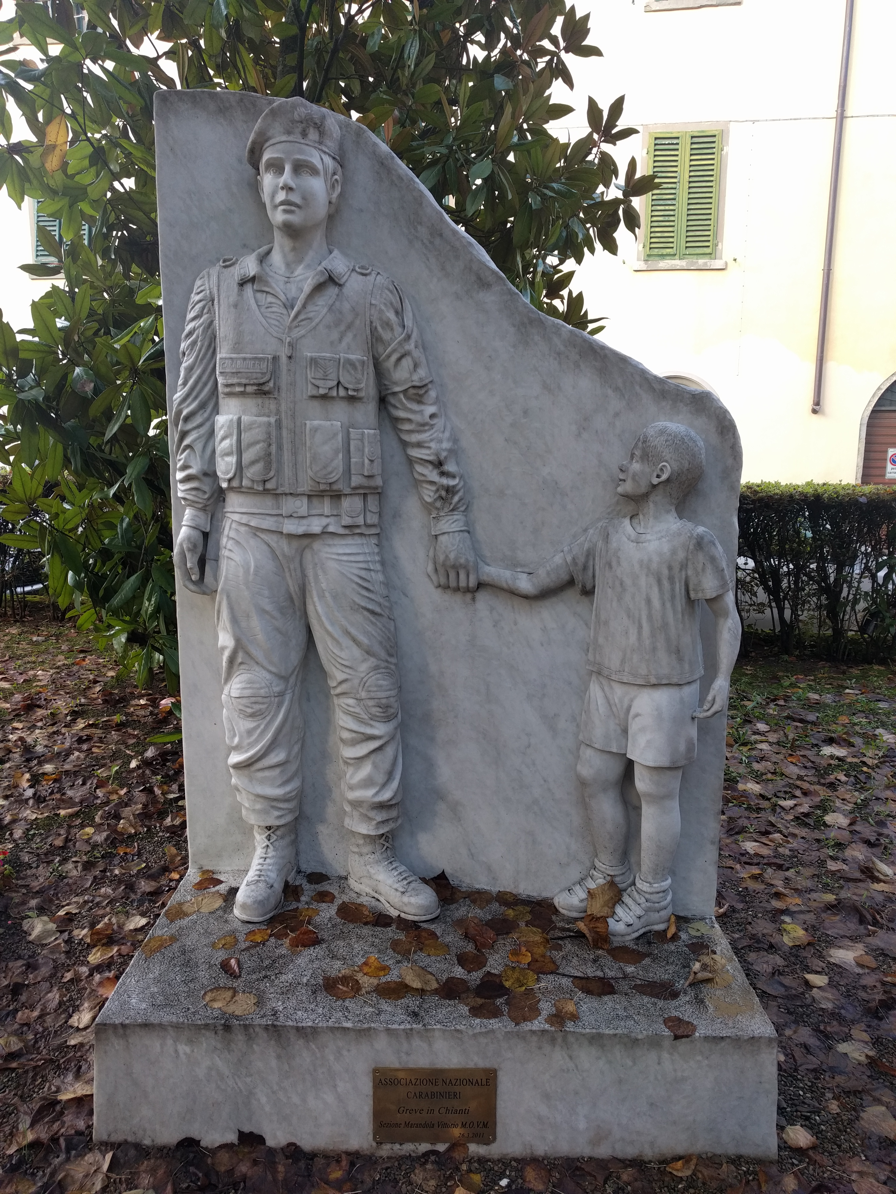 Monumento ai caduti d Nassirya a Greve in Chianti